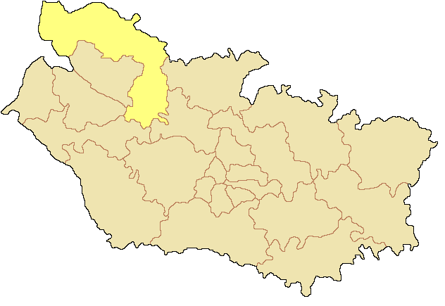 Canton de Rue dans le département de la Somme